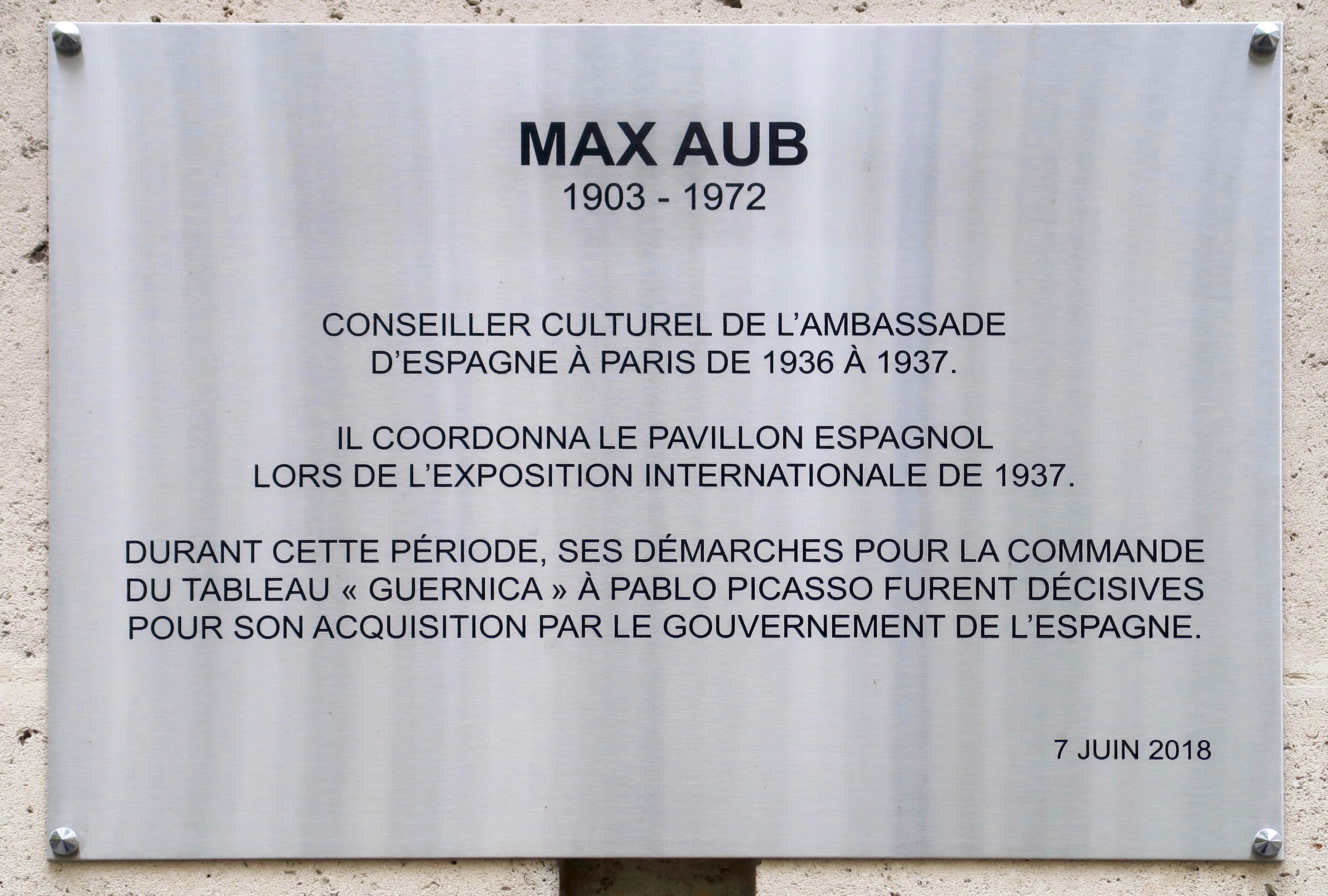 Plaque en hommage à Max Aub, ambassade d'Espagne Paris